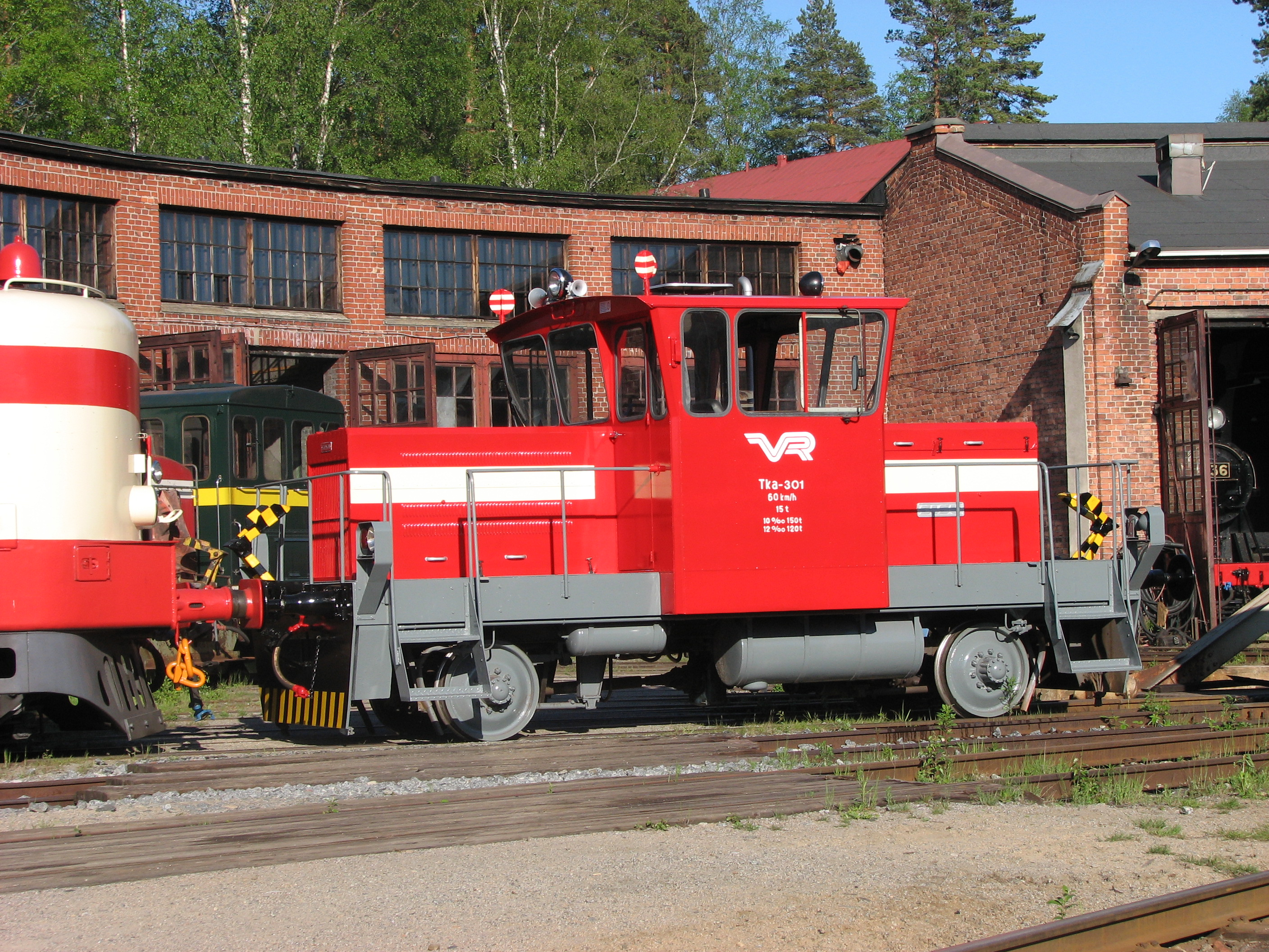 Tka3-sarjan ratakuorma-auto o 301 museoituna Haapamäellä.